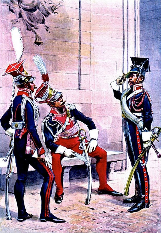 Officiers en grande tenue (à gauche et au centre) et sous-officier en tenue de route (à droite) des chevau-légers lanciers polonais de la Garde impériale.